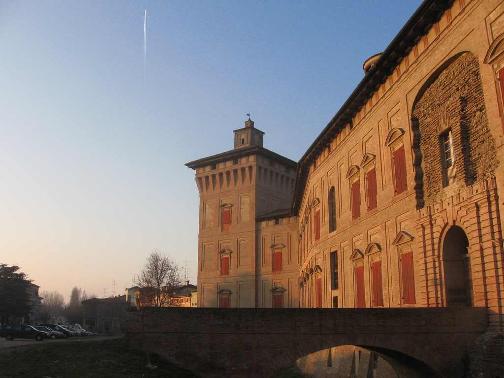 Rocca dei Boiardo, Scandiano (RE) - ITALY